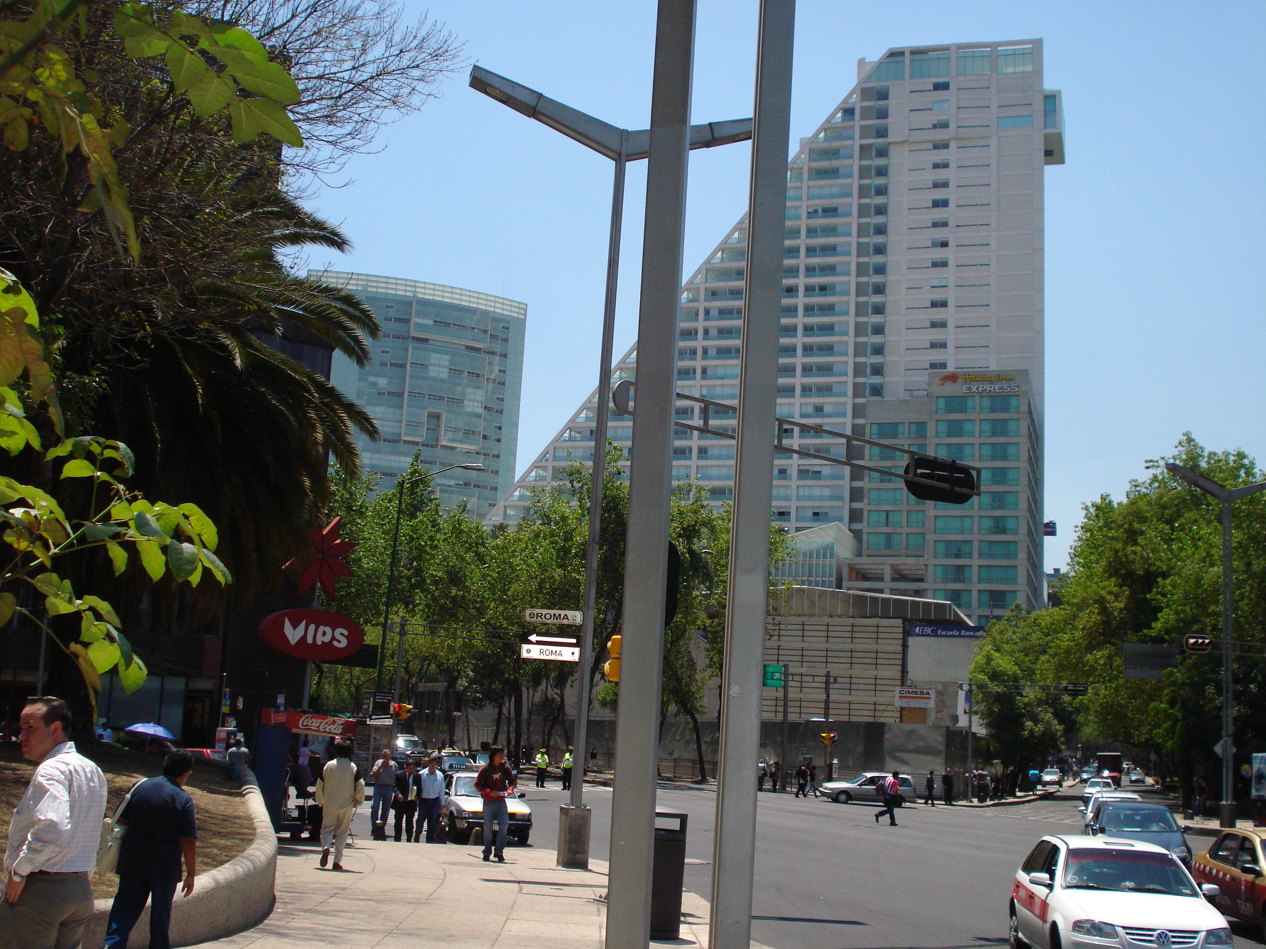 Reforma 222 torre 1 y torre 3 en la Ciudad de México